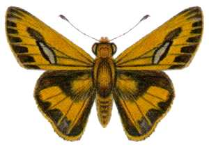 Telicota colon argeus